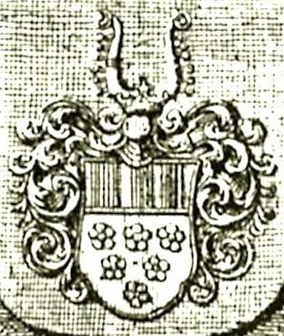 Wappen derer von Brenkenhoff